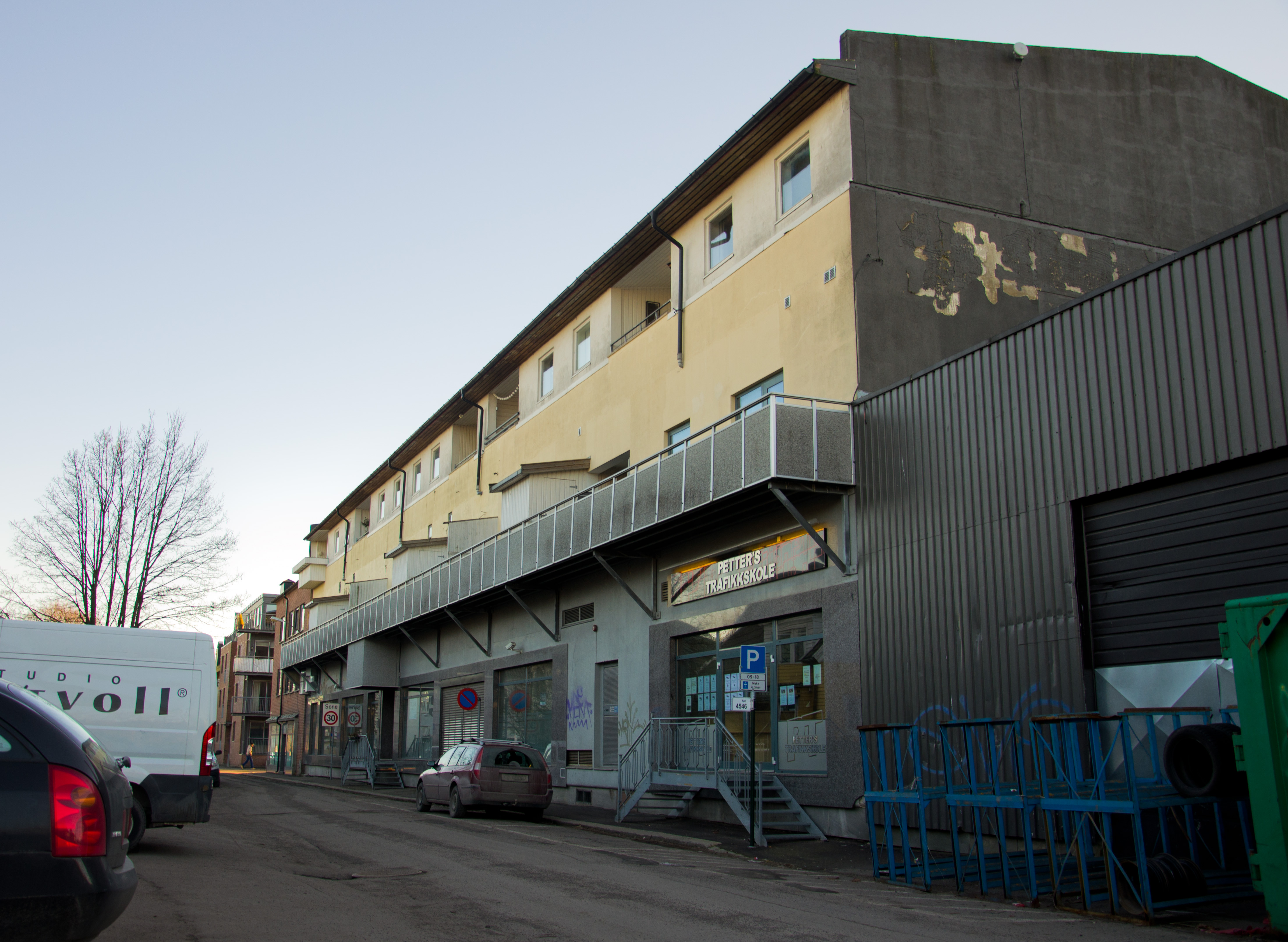 Meierigaten 1-3, Tønsberg